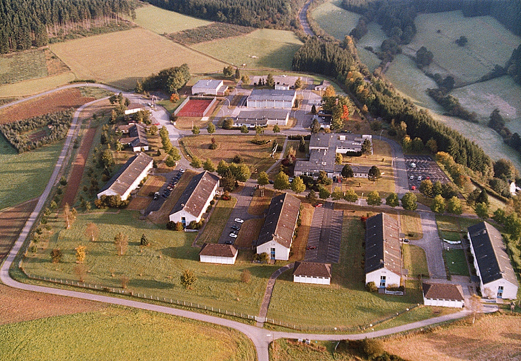 Luftbild der Sauerlandkaserne nördlich von Lennestadt-Oedingen 2002.